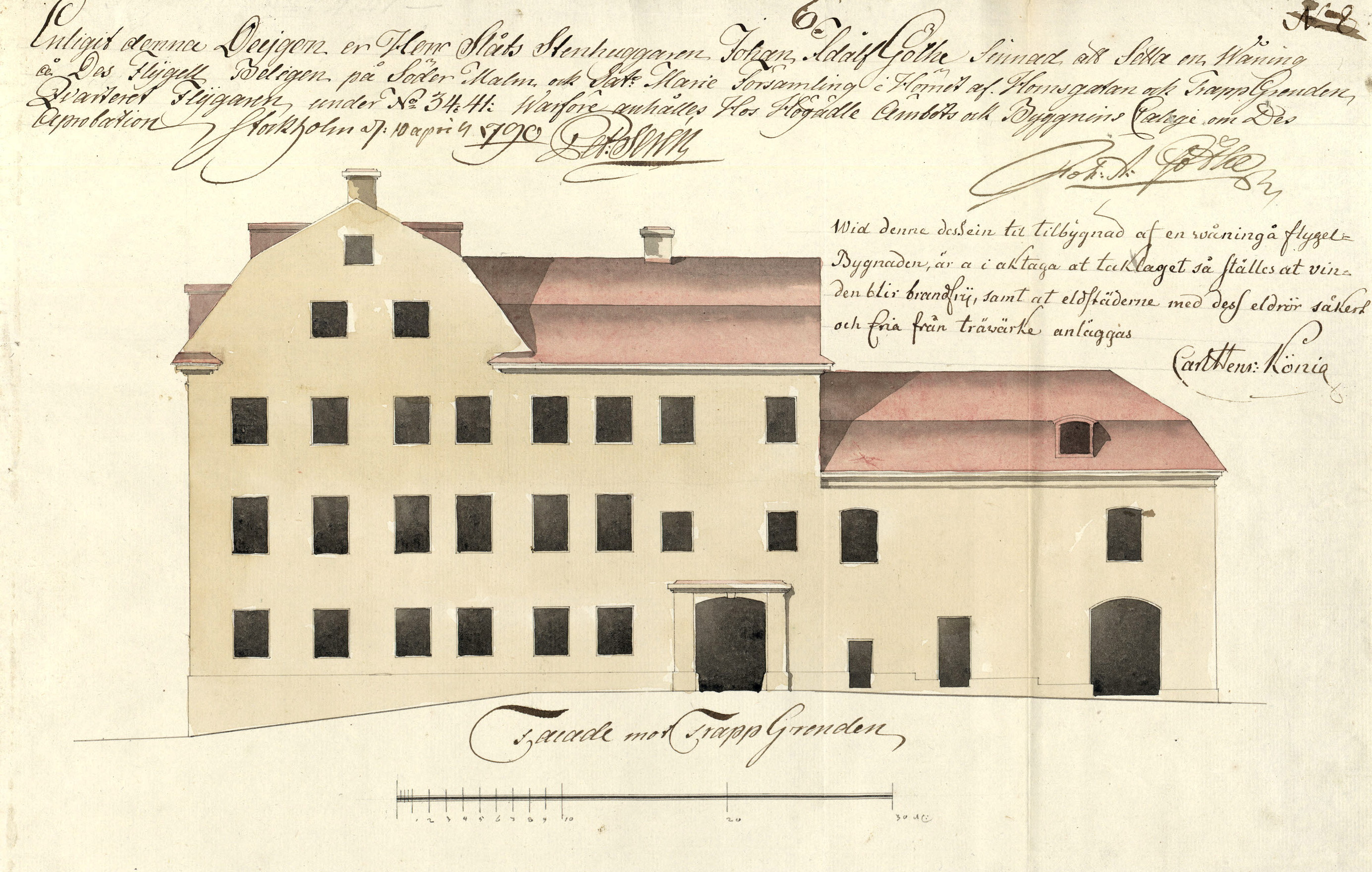 slottsstenhuggaren J. A. Göthes hus i kvarteret Svalgången, Södermalm, ritning av Petrus Serén